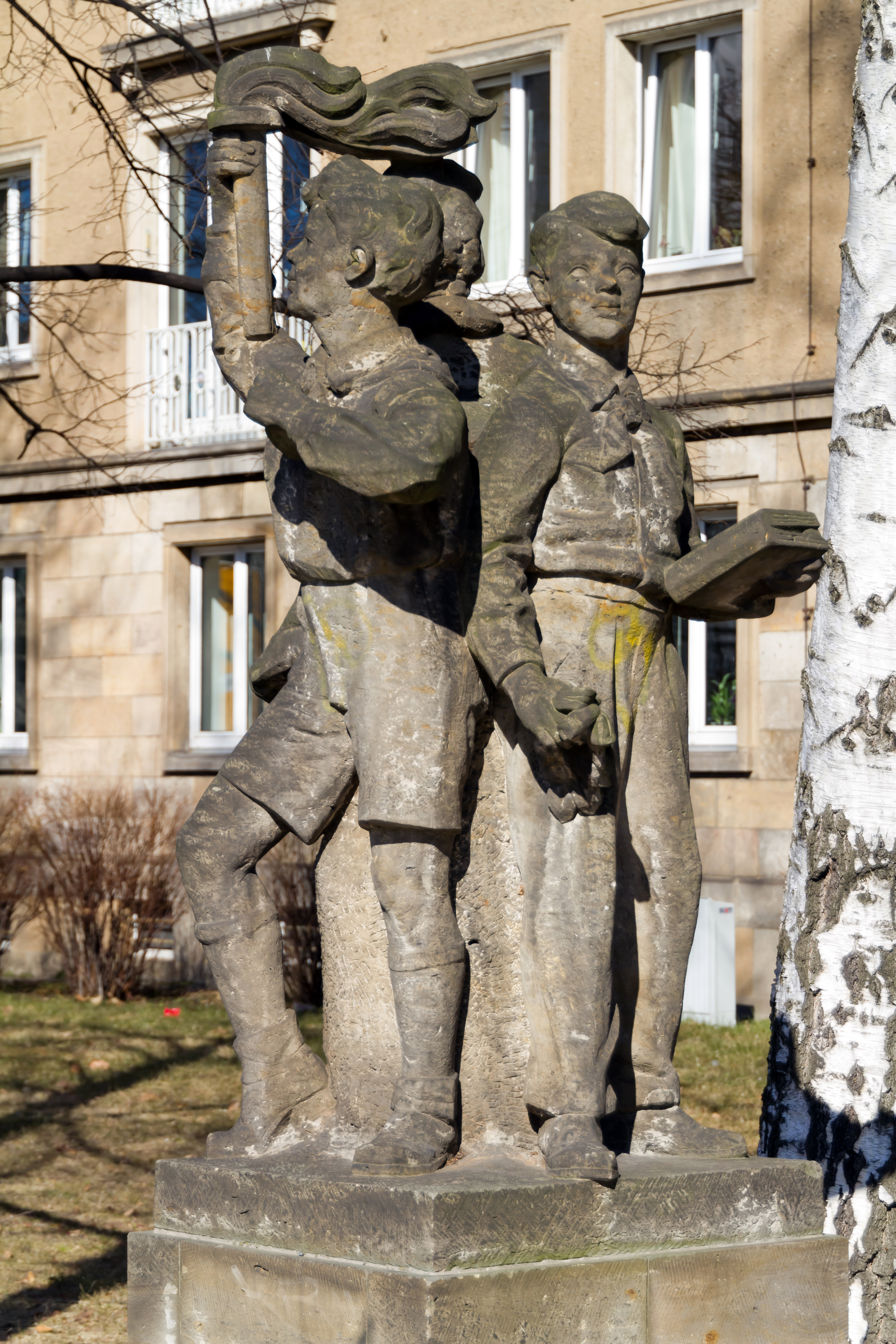 Sandsteinplastik Junge Pioniere von Kurt Loose Grunaer Straße, Dresden